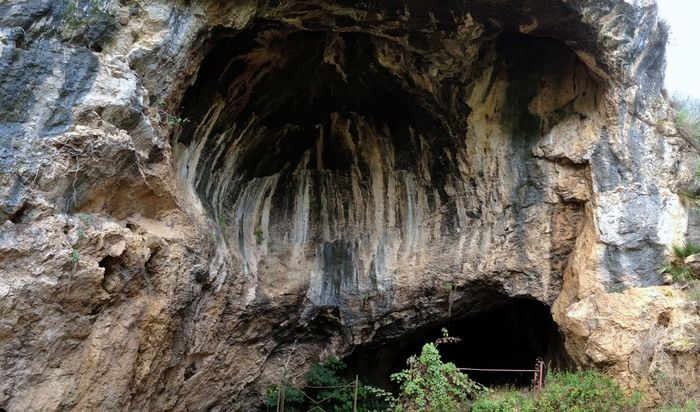 Cova Negra